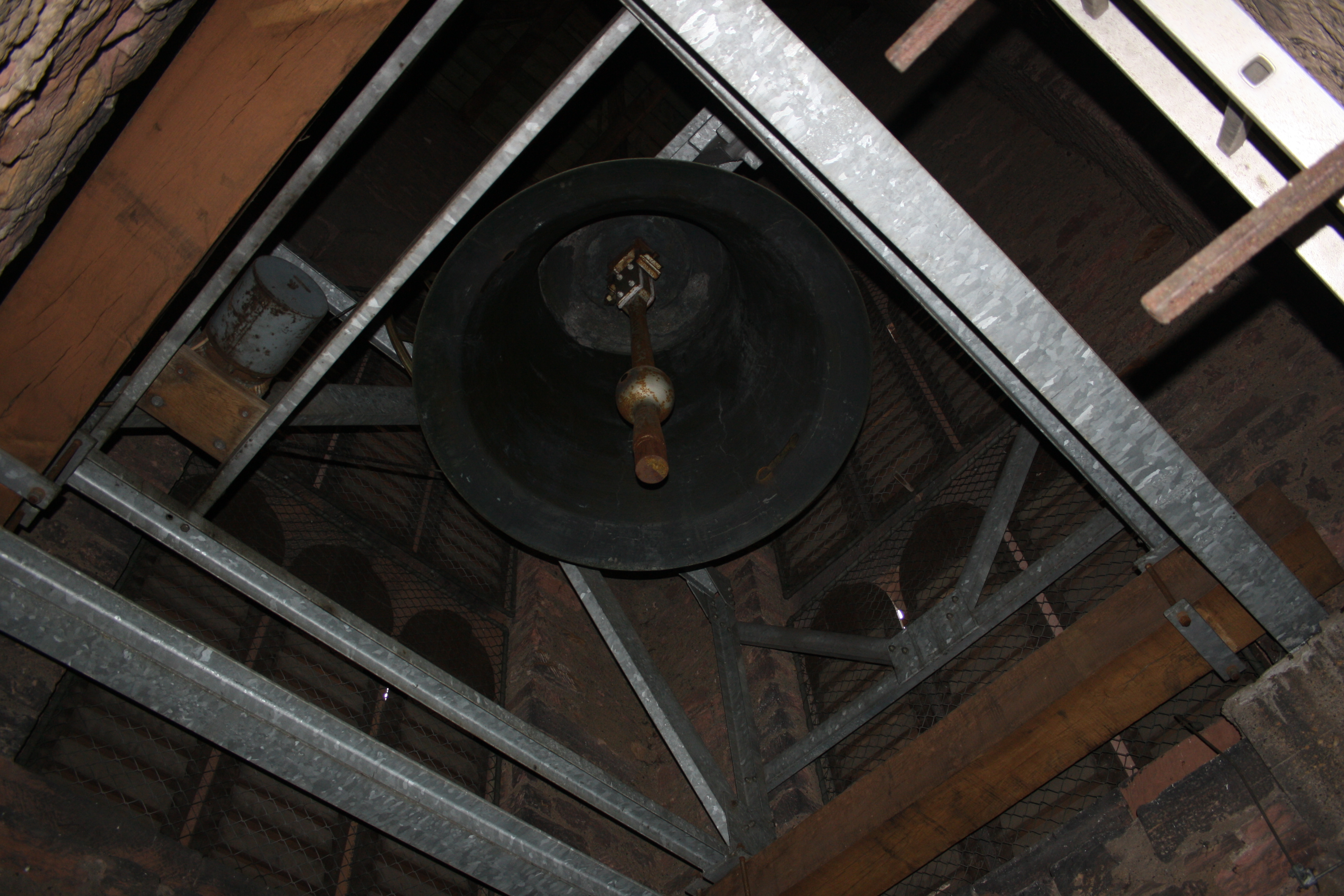 Die Glocke 1 der katholischen Pfarrkirche St. Bartholomäus Biblis